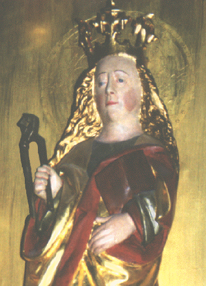 Korrekt Apollonia, Härnevi kyrka. Härnevi Saint Apollonia helgonbild.